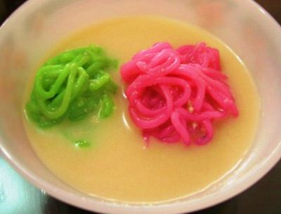 kue putu mayang adalah kue tradisional betawi yang dibuat dari tepung kanji & tepung beras. cara memakan kue ini dengan siraman gula merah & santan,sedangkan. orang tua betawi dahulu memberi tambahan sedikit taburan kelapa pada gula putu mayang tersebut. putu mayang bearasal dari bahasa jawa puthu & wayah yang berarti cucu/silsilah tetapi karena lidah masyarakat betawi maka penyebutan vocal h berubah menjadi ng . putu mayang sendiri sudah jarang ditemukan dijakarta saat ini karena itu kita sebagai warga negara harusnya menjaga dengan baik kuliner indonesia dengan baik